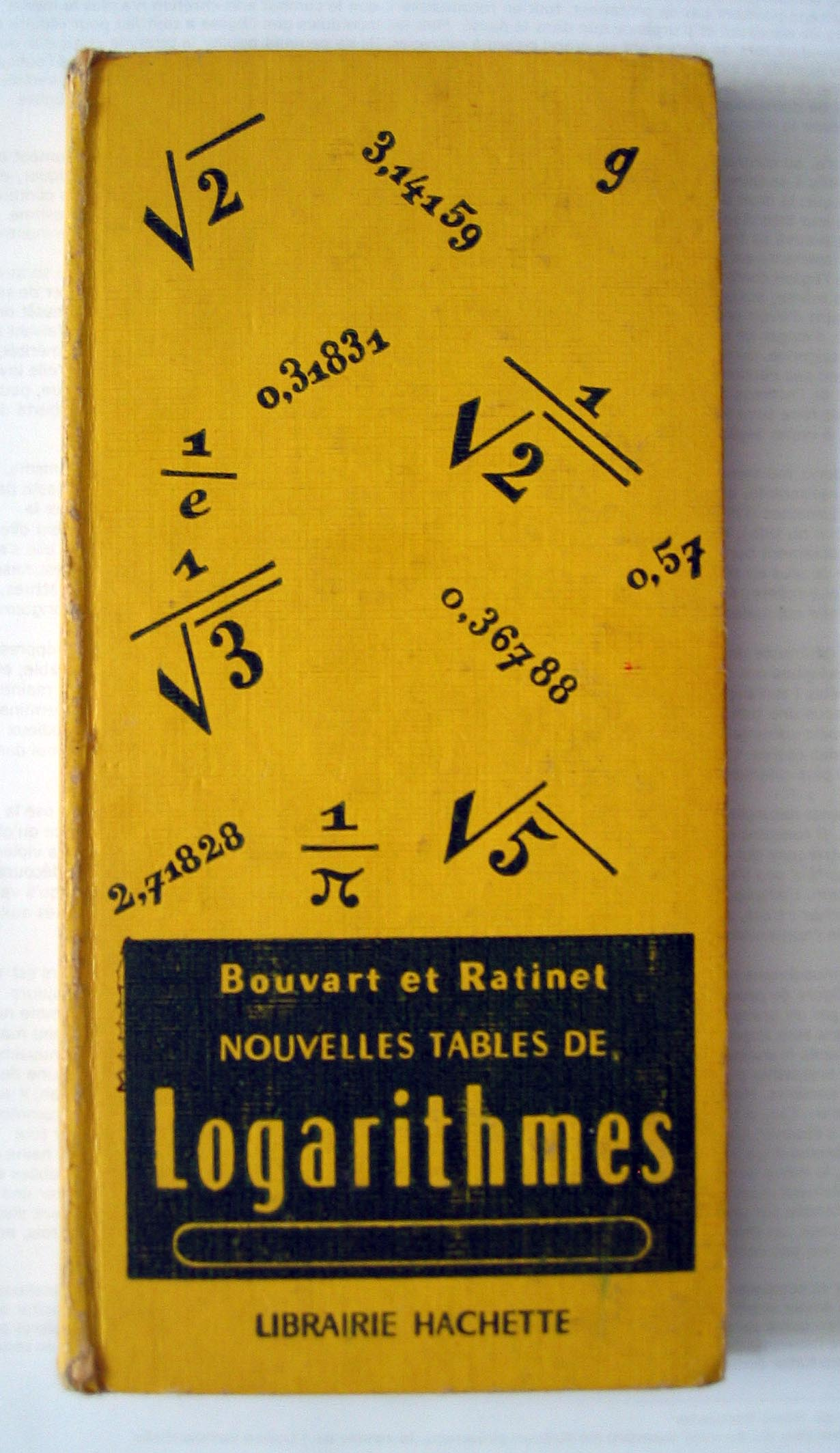 Tables de Logarithmes Auteur : Monster1000 France, juillet 2005